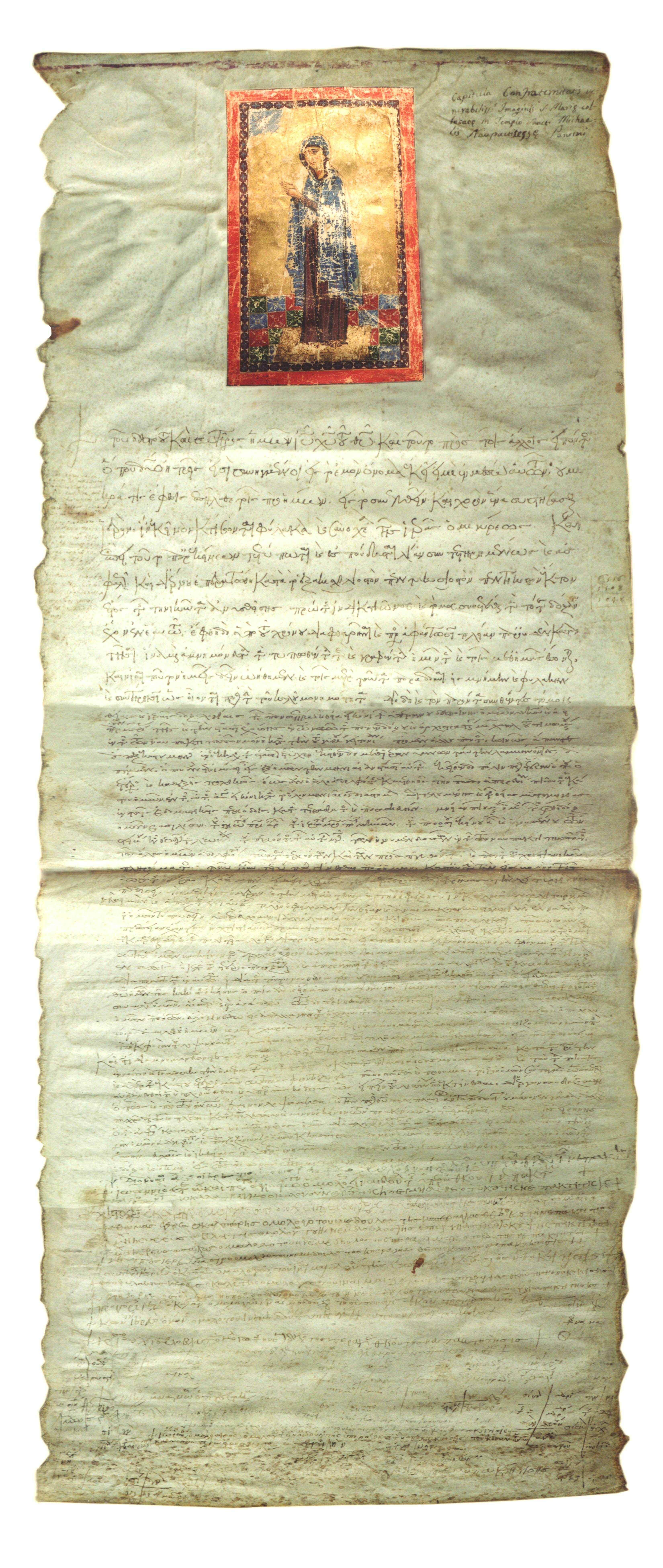 Φωτογραφία από περγαμηνή του 11ου αι. πού φυλλάσεται στο αρχείο της Regia Cappella Palatina του Παλέρμο